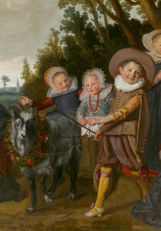 Frans Hals, Enfants de la famille Van Campen avec une voiture tirée par un bouc (fragment), vers 1623-1625. Huile sur toile. – 152 × 107,5 cm, Musées royaux des Beaux-Arts de Belgique, Bruxelles, inv. 4732